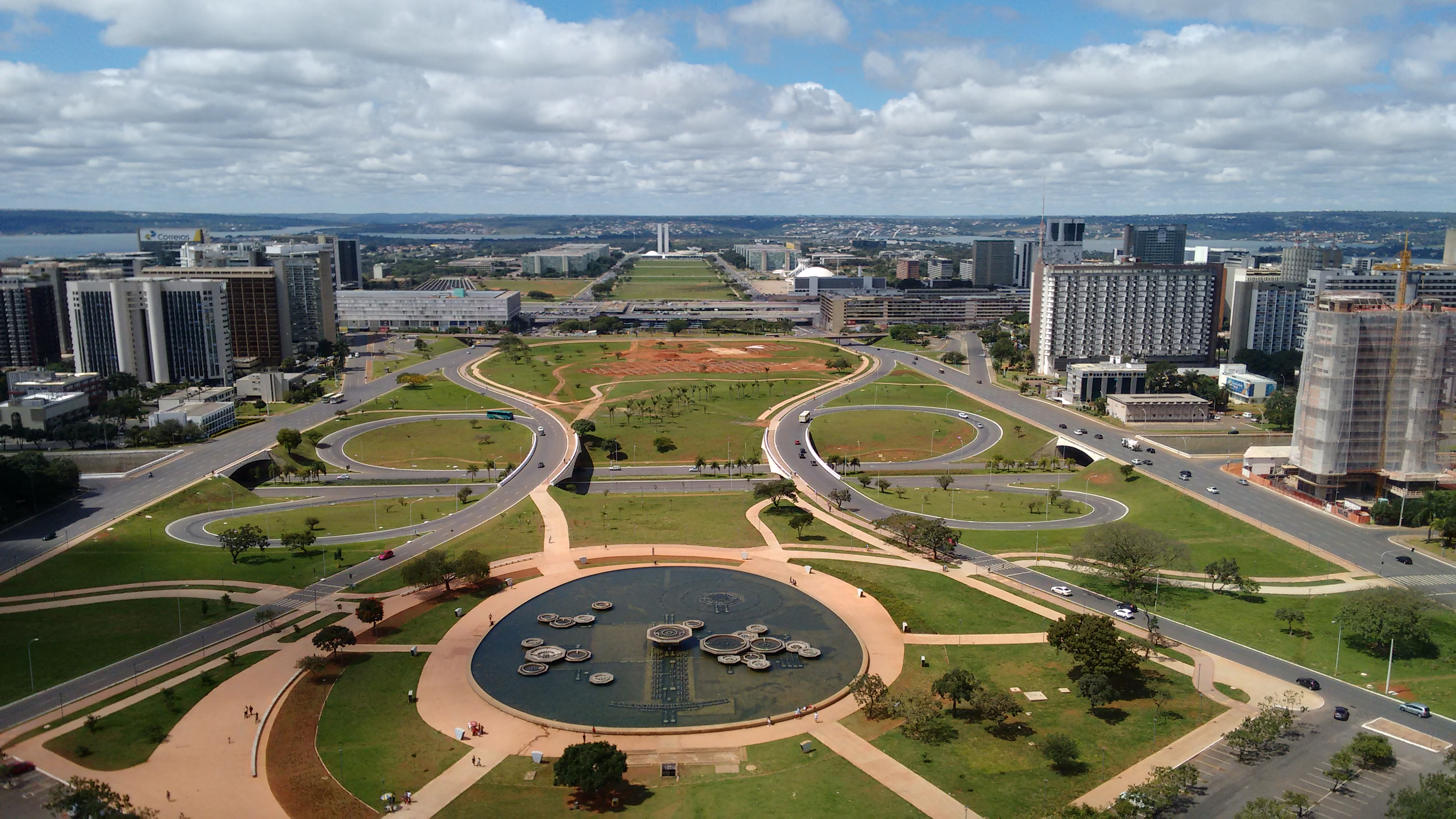 Conjunto urbanístico de Brasília construído em decorrência do Plano Piloto traçado para a cidade